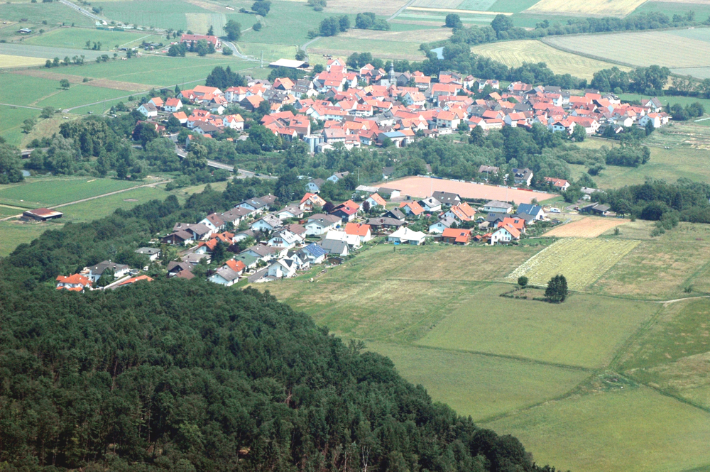 Luftaufnahme von Weimar-Roth aus südlicher Richtung. Im Vordergrund Ortsteil Heier und im Hintergrund das alte Dorf.